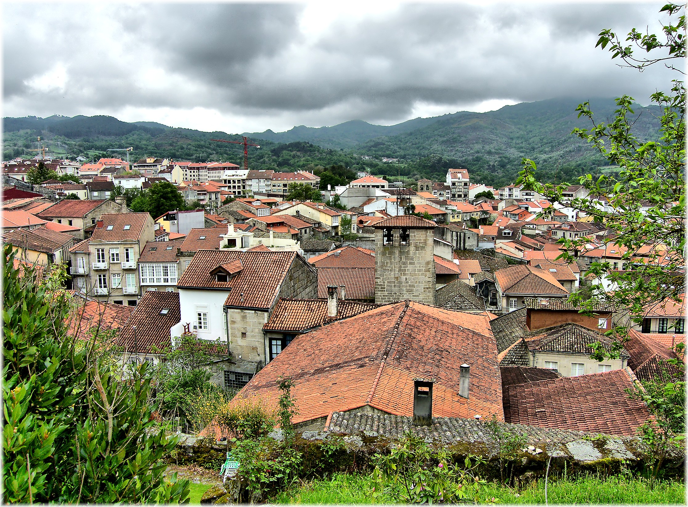 Allariz. Tomada dende os restos do castelo no alto da vila.